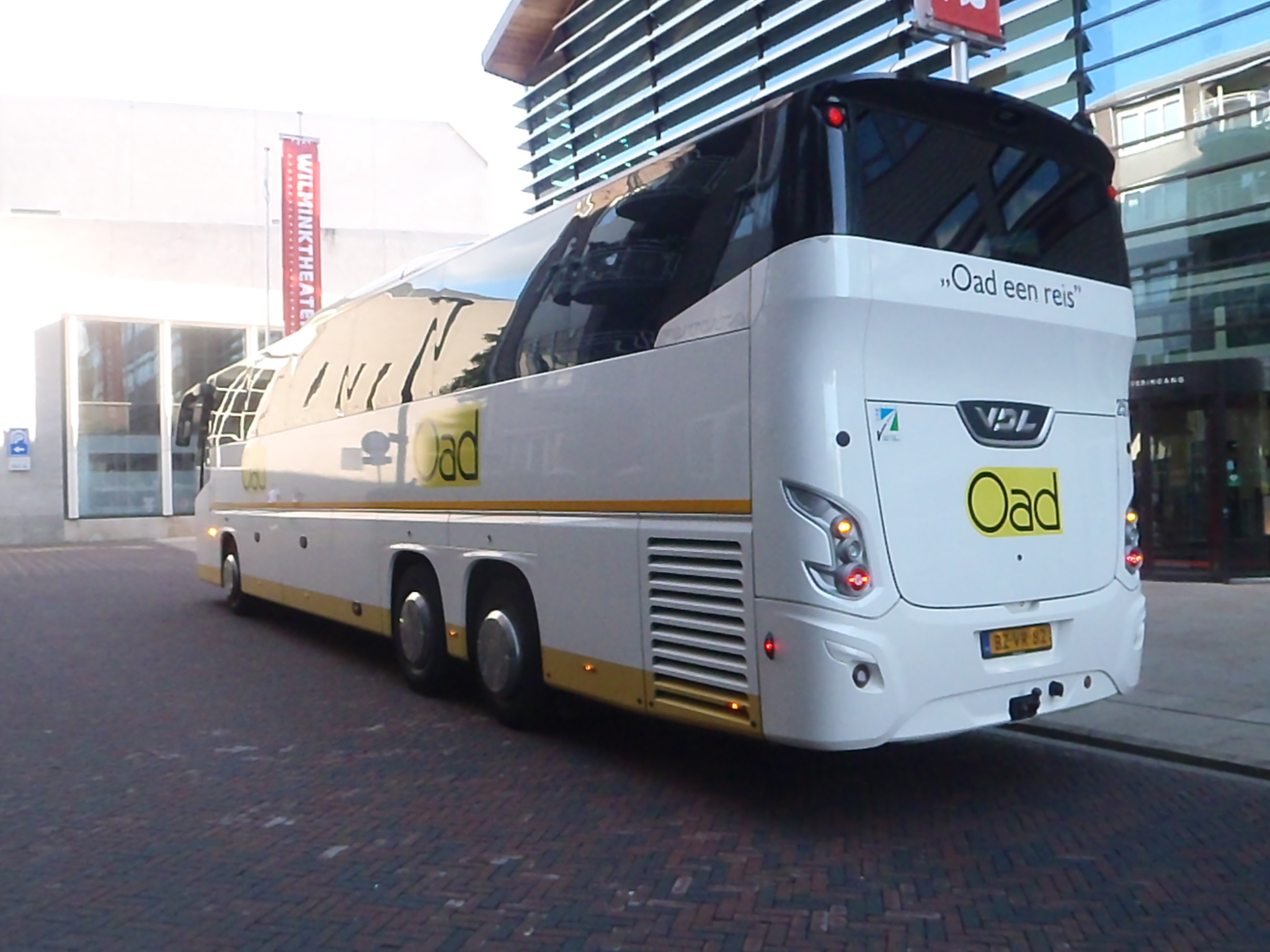 een bus van oad in de huidige kleuren van oad vrij om te gebruiken